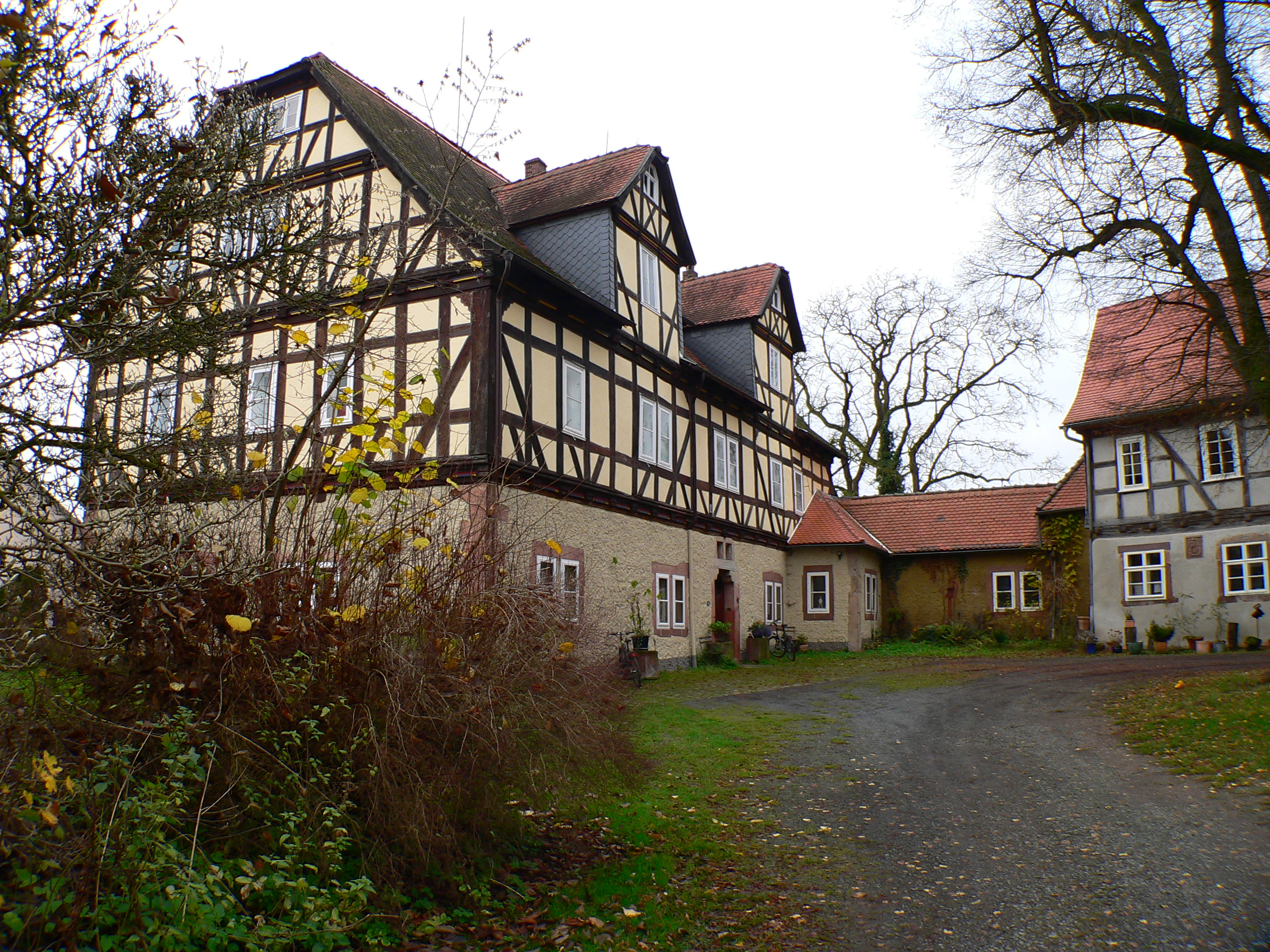 Schloss Rommershausen in Schwalmstadt-Rommershausen, Hessen, Deutschland